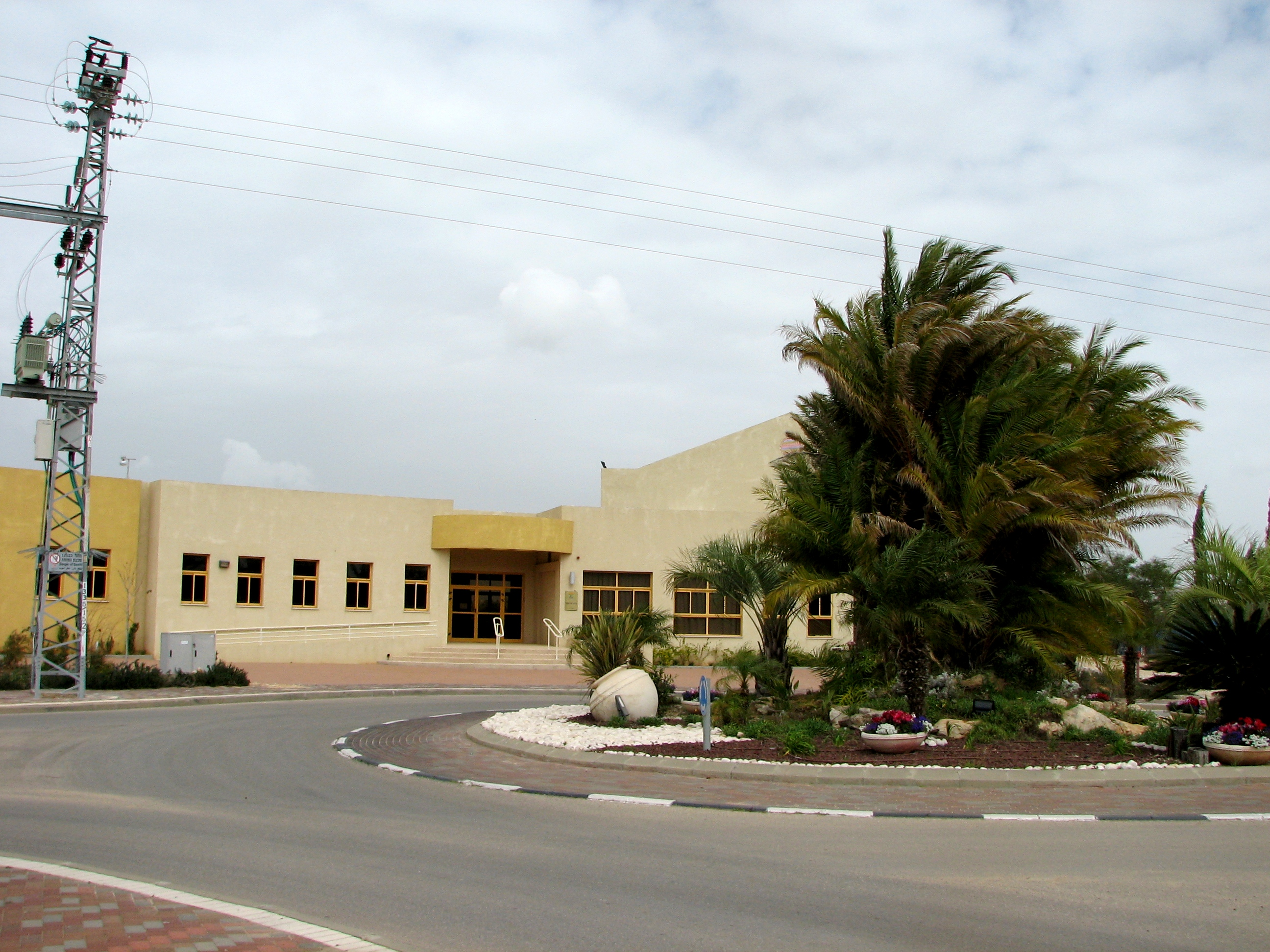 Nirit is a communal settlement in central Israel. נירית הוא יישוב קהילתי באזור השרון, ליד היישוב מתן ויער חורשים המתנ"ס הקהילתי של נירית